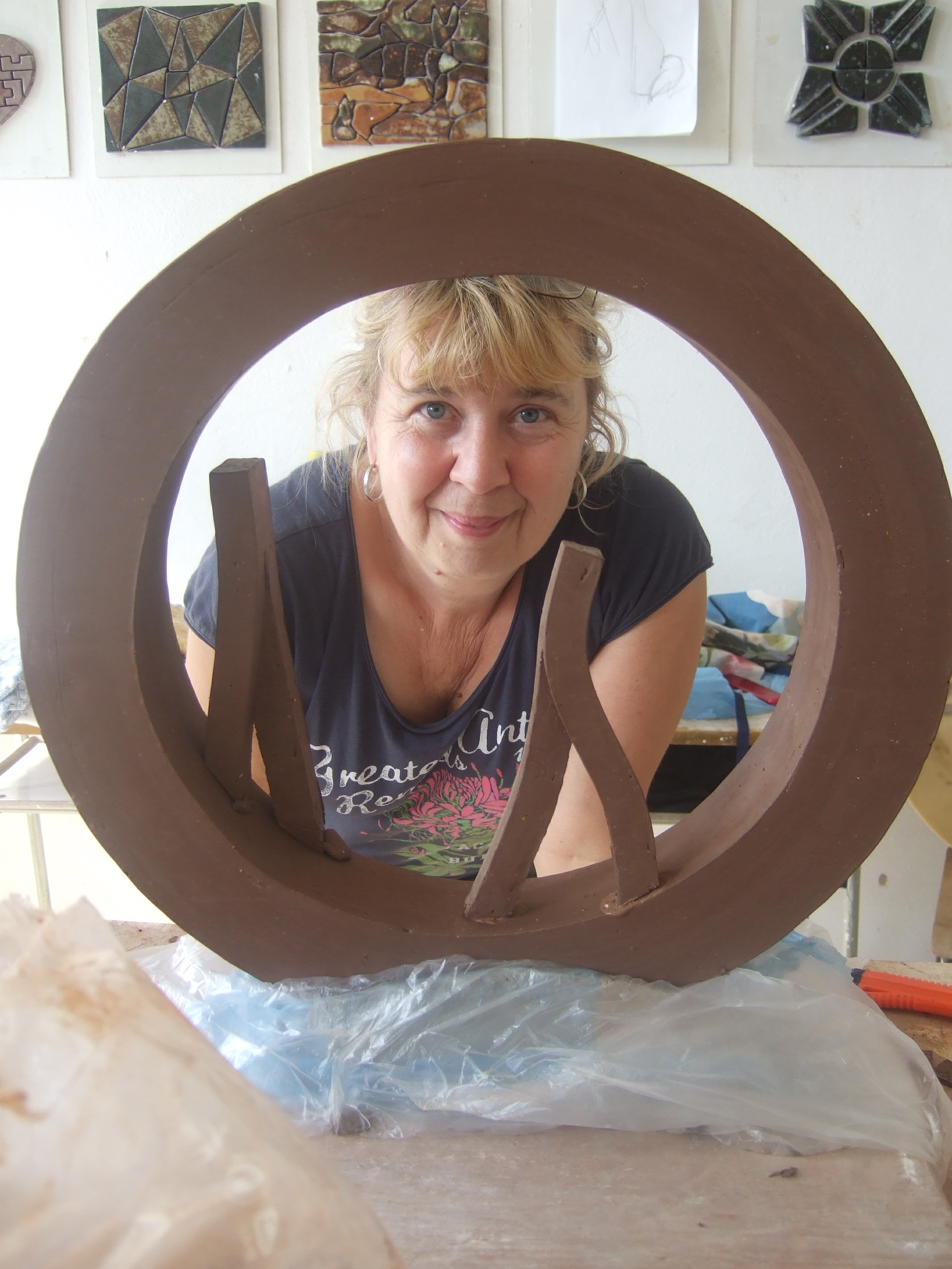 Monika Hinterberger während dem Keramik-Symposium in Bechyne 2012